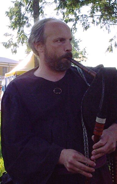 Зміцер Сідаровіч грае на дудзе на вуліцы Наваградка ў час фэсту сярэднявечнай культуры.